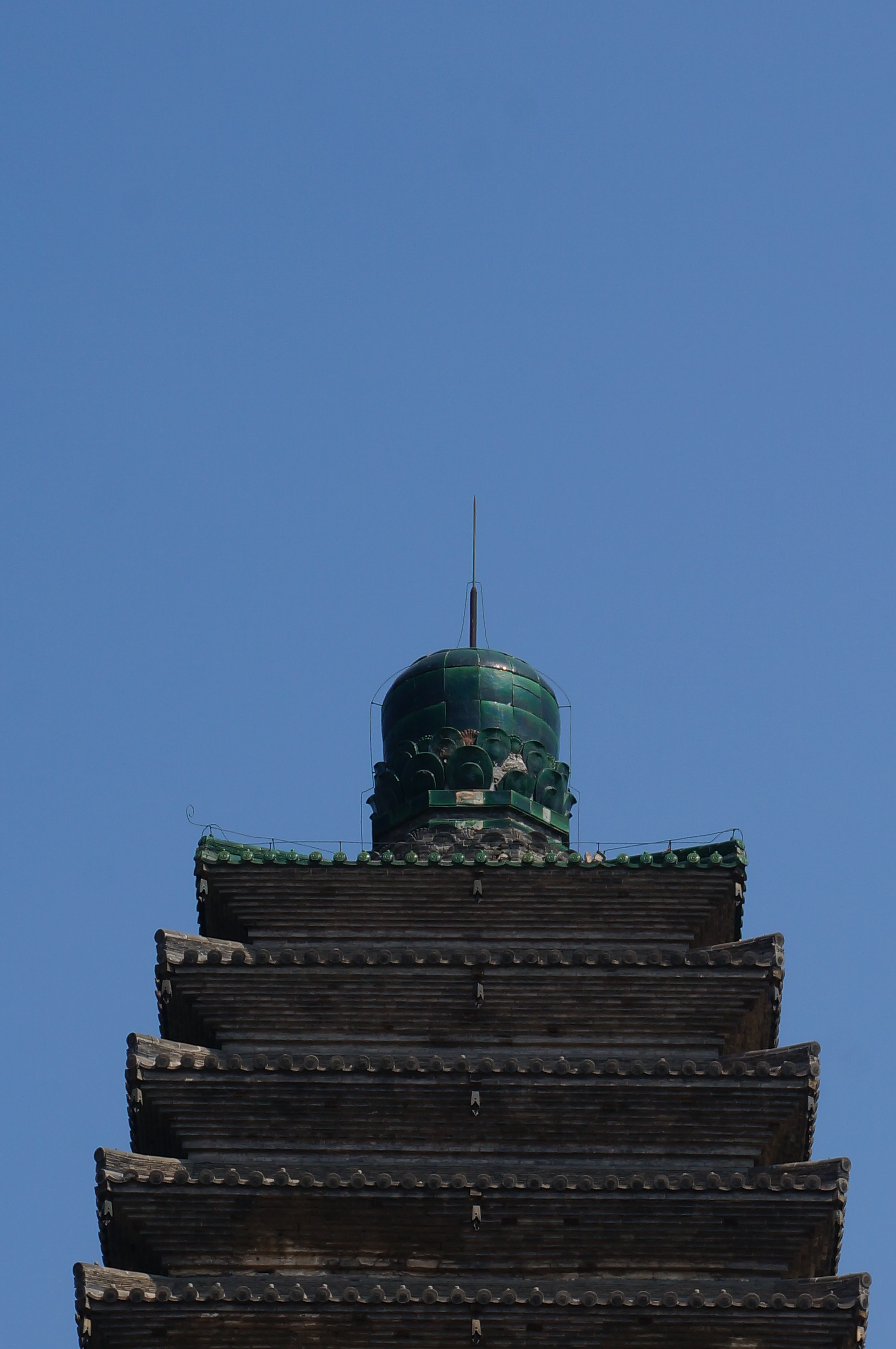 朝阳北塔，南面塔刹局部。